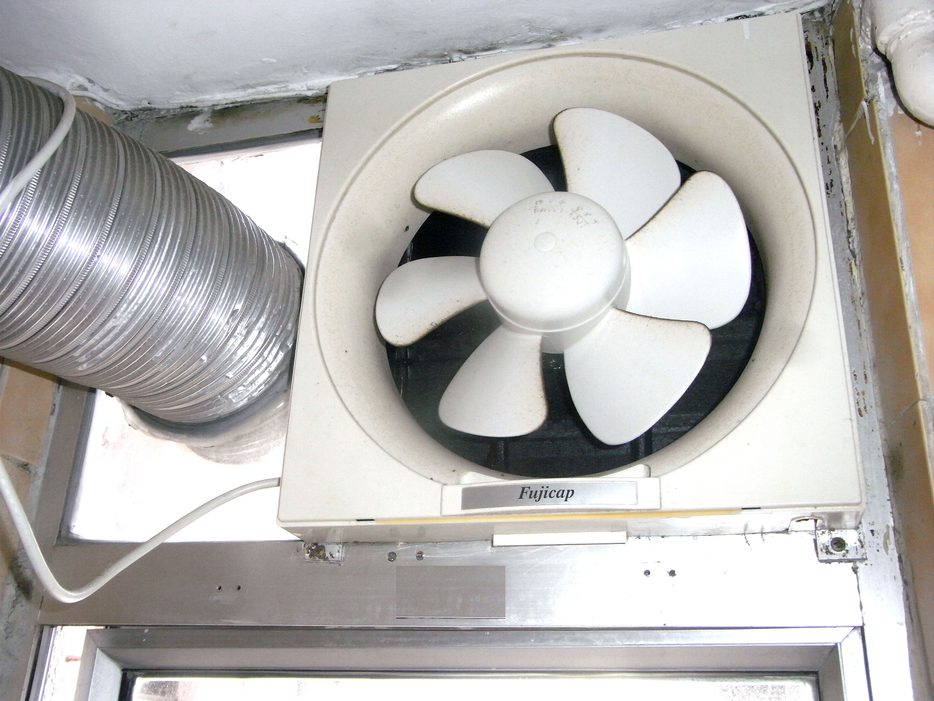 中文（香港）: 廚房